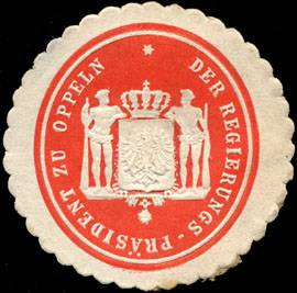 Sealing stamp Title: Der Regierungs Präsident zu Oppeln Description: rot, weiß, geprägt Place: Oppeln size: 4x4 cm